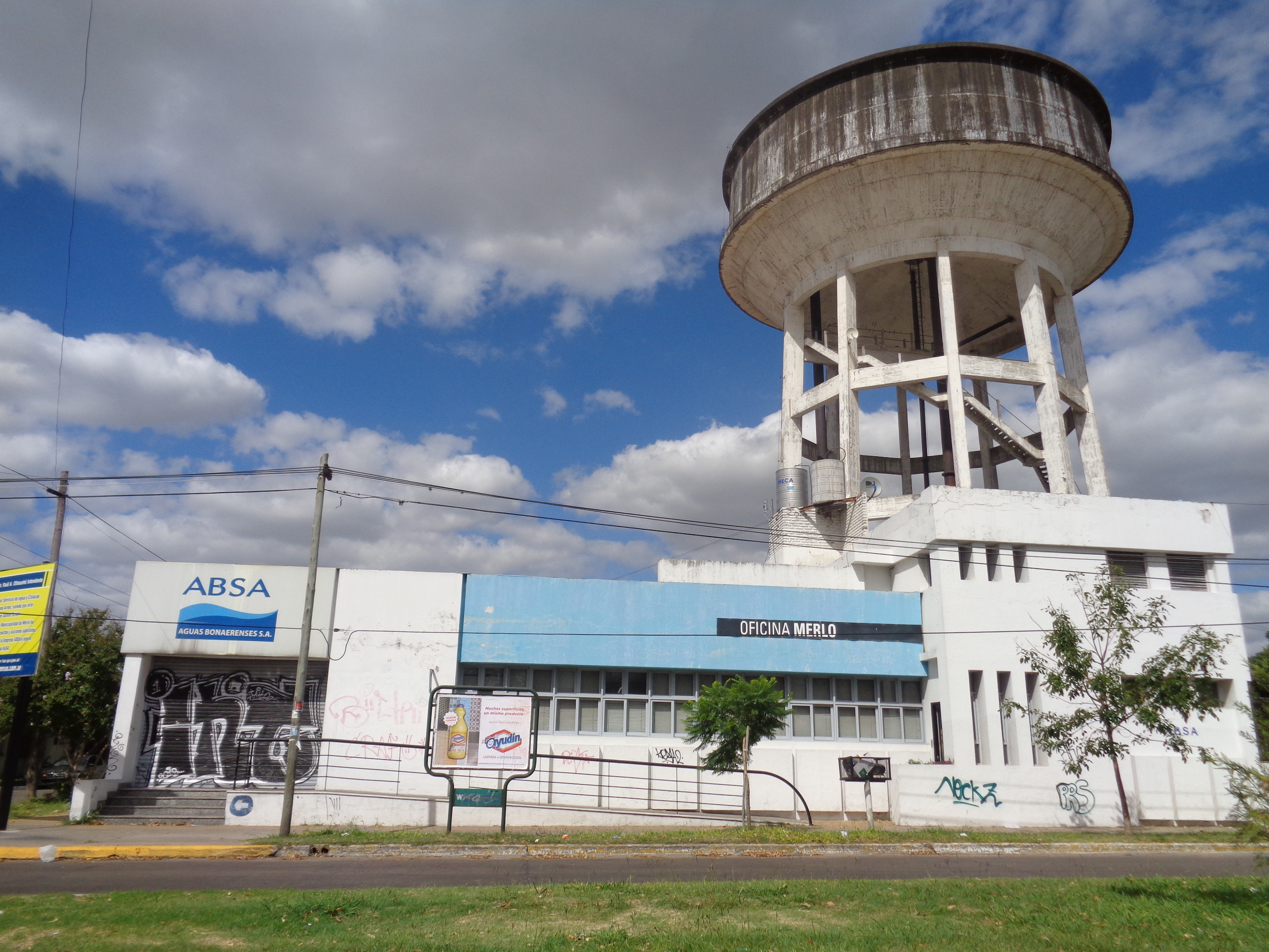 Edificio donde se ubica las oficinas de la empresa provincial: ABSA (Aguas Bonaerenses Sociedad Anónima) en el partido de Merlo.